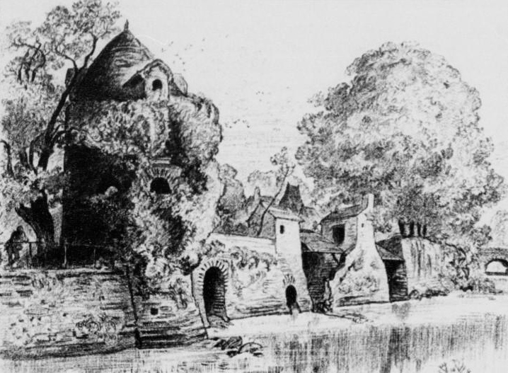 Les bords de l'Ellé à Quimperlé vers 1900 (lithographie d'Albert Robida publiée dans "La vieille France. Bretagne")